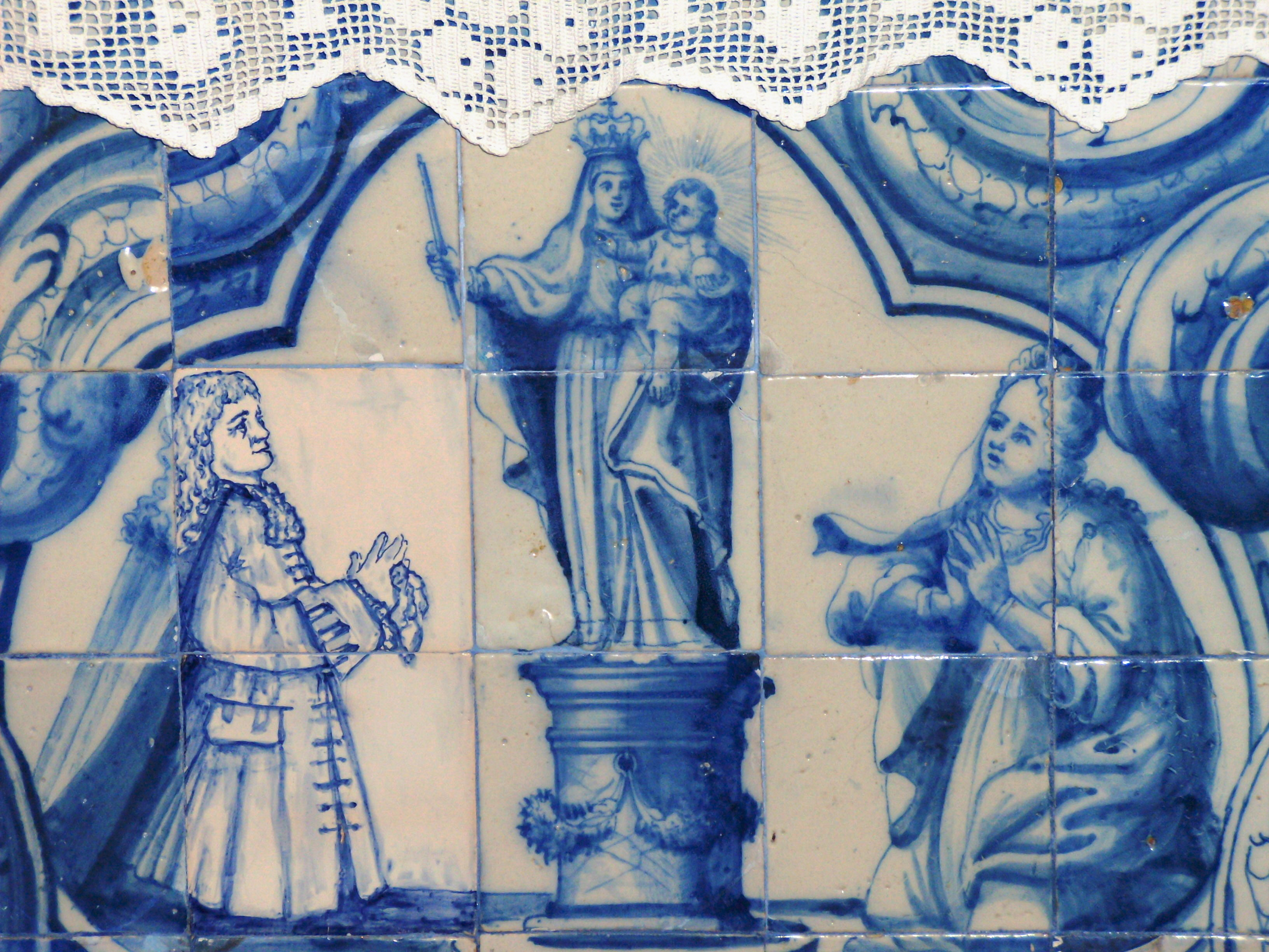 Ermida de Nossa Senhora do Pilar, ilha de Santa Maria, Açores: detalhe do painel de azulejos no frontal, representando Nossa Senhora do Pilar com o Menino, ladeada pelos doadores.